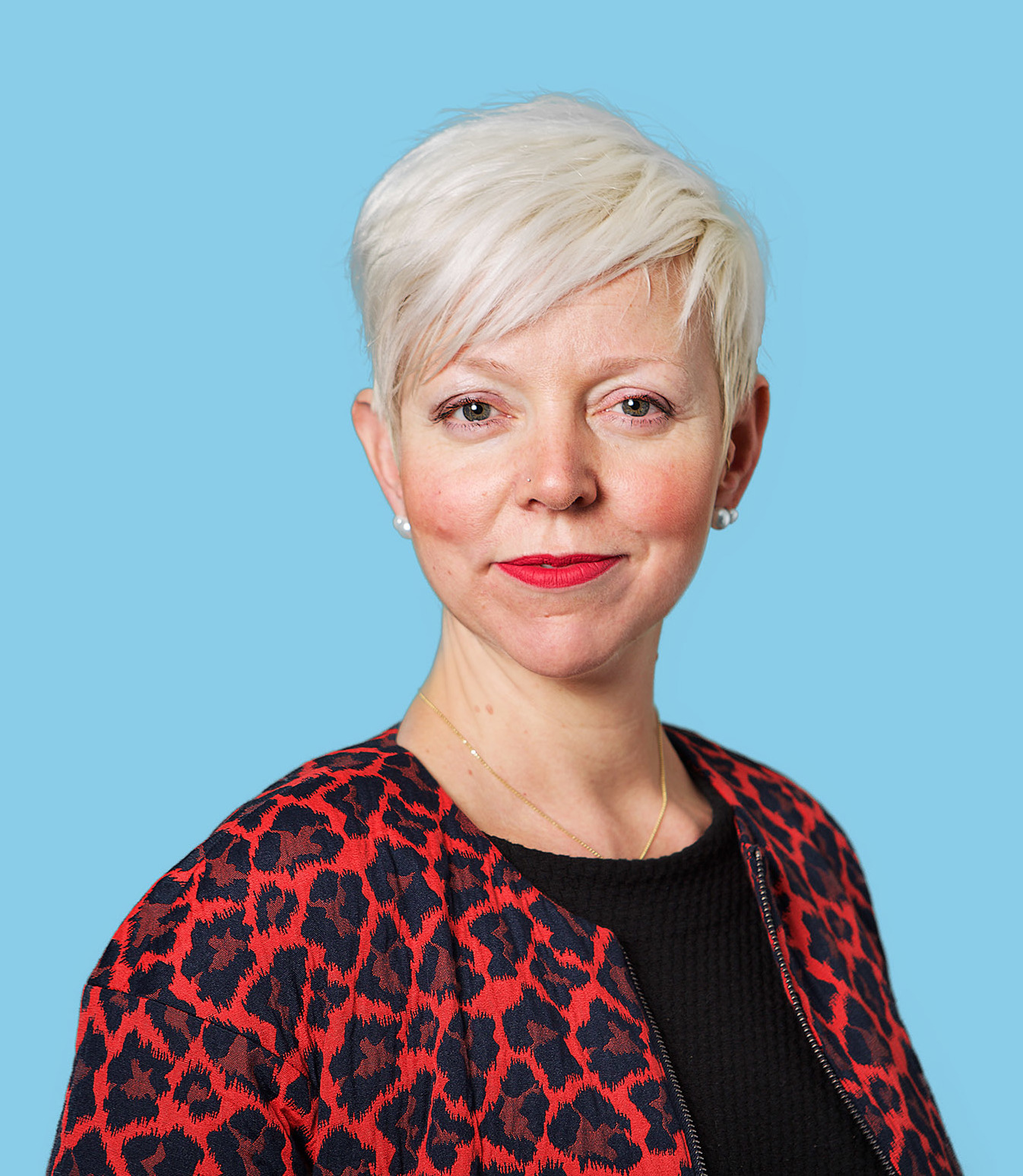 Kandidaat-Kamerlid. Foto: Lex Draijer.